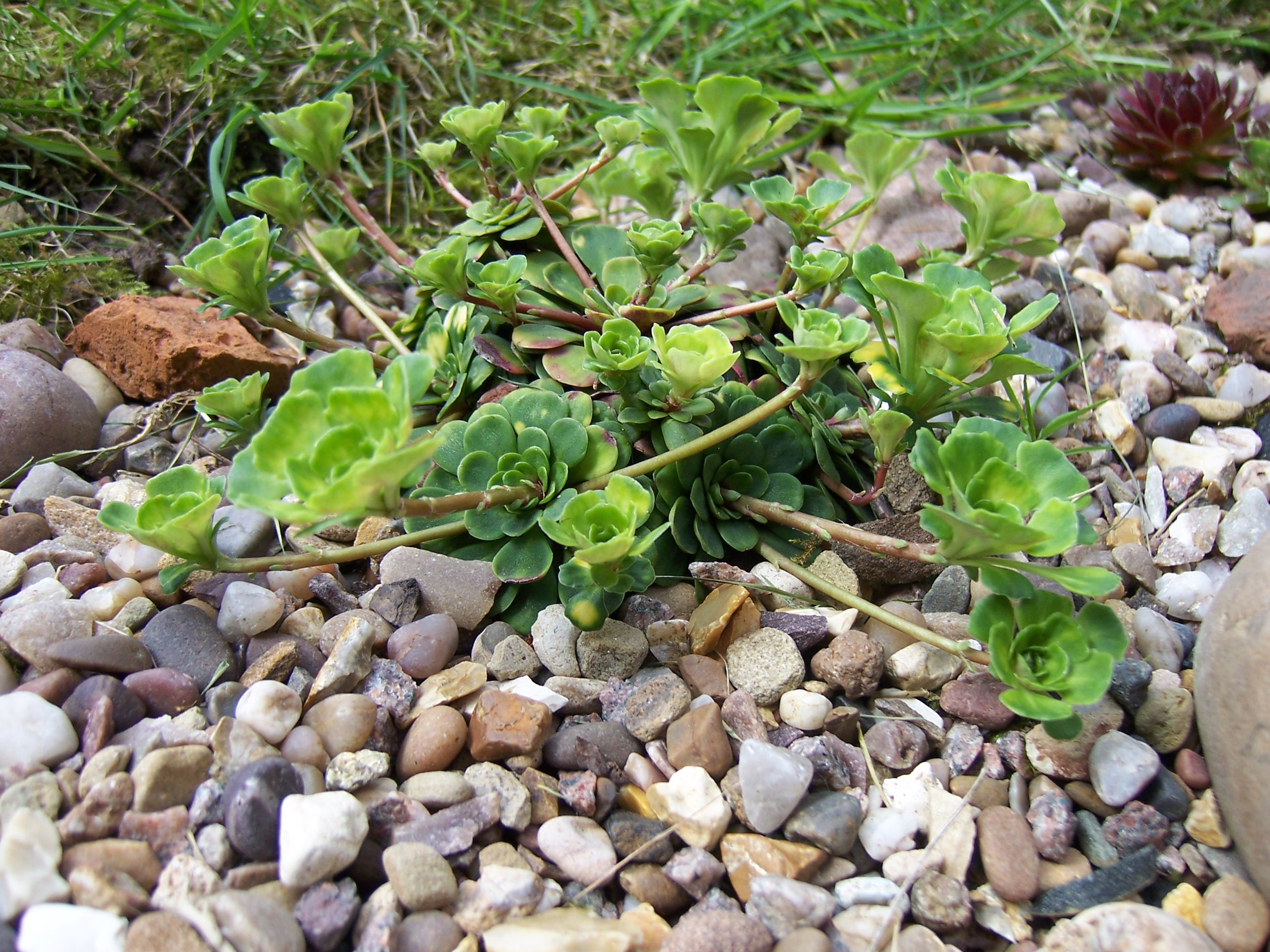 Saxifraga cuneifolia 'Variegata'